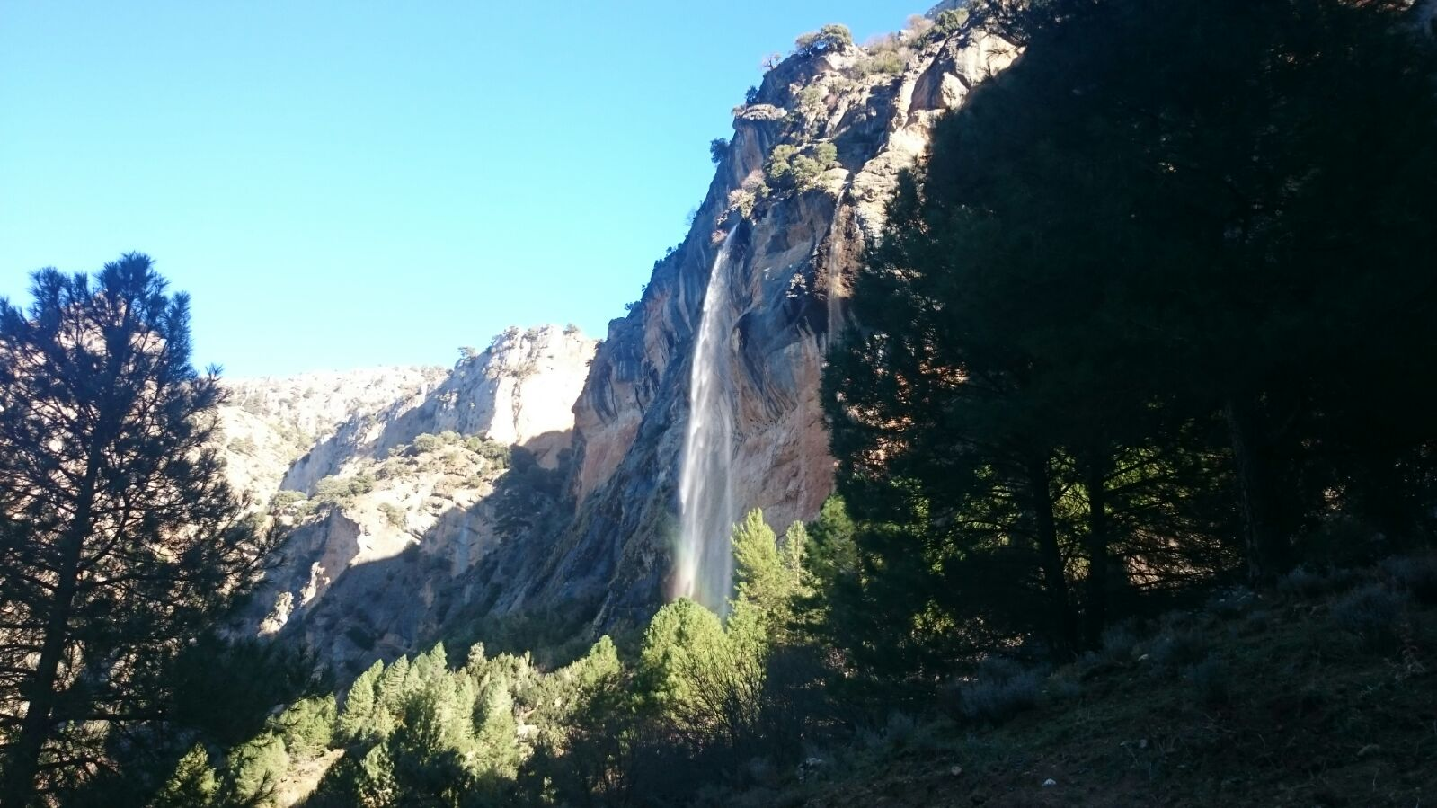 Cascada del Arroyo de La Toba, precipitándose desde la pedanía homónima.